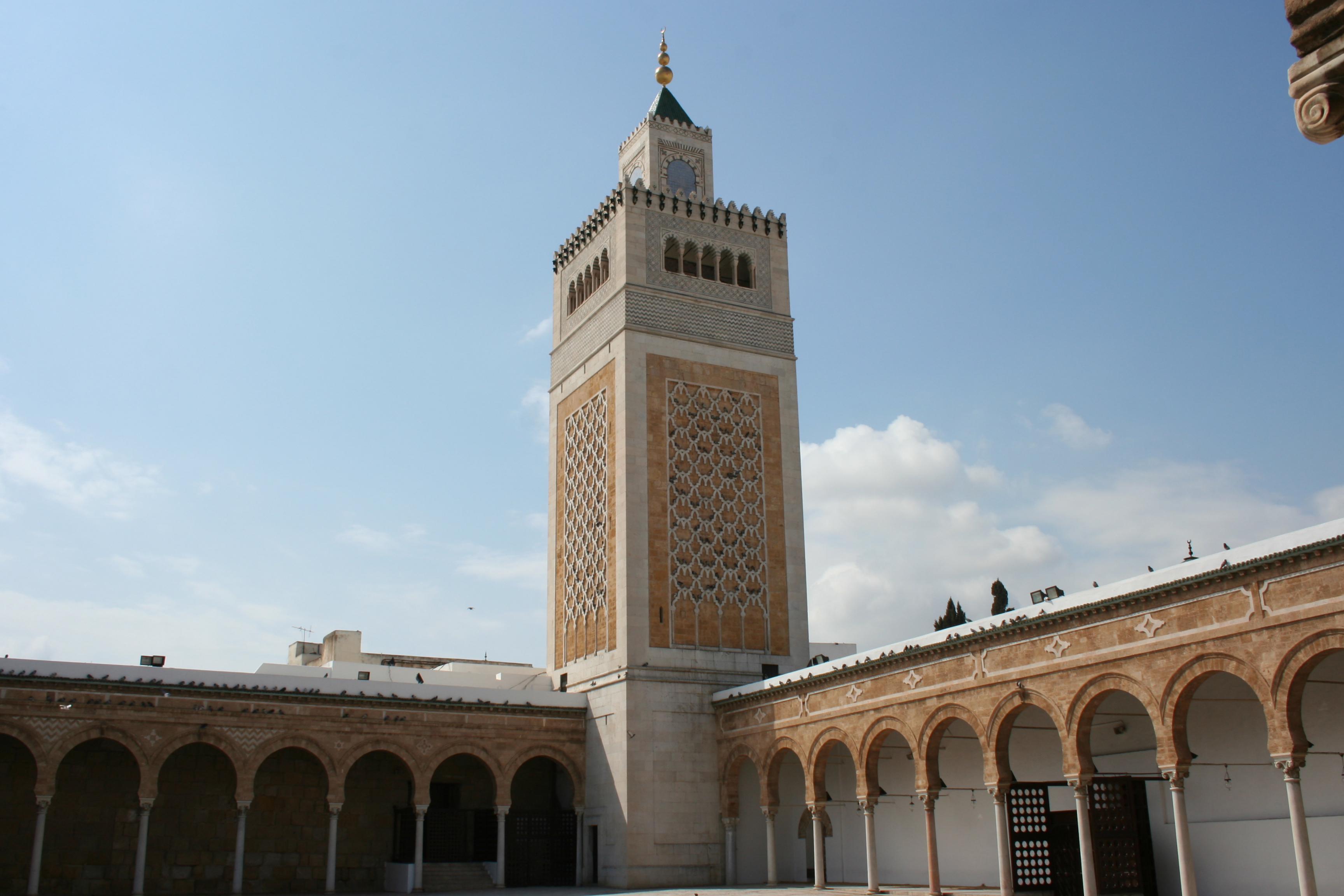 Medina de Túnez